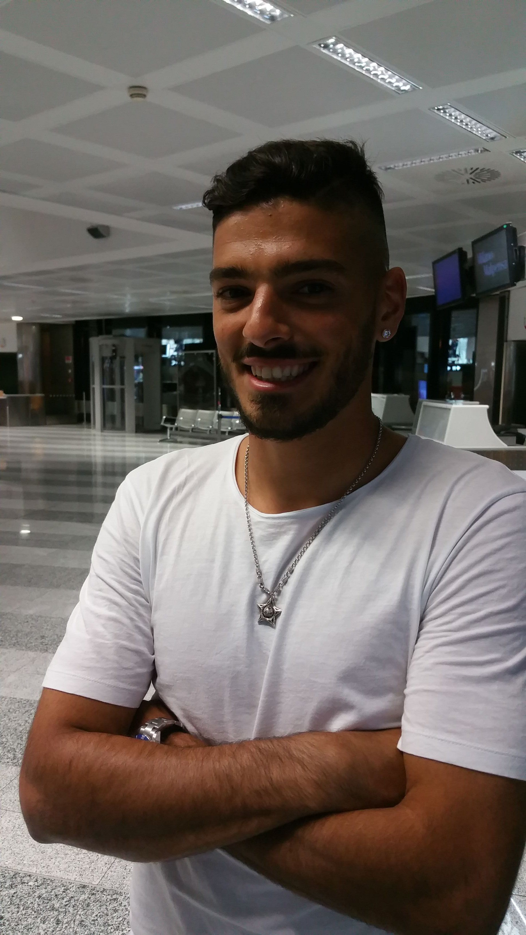 אופיר מזרחי